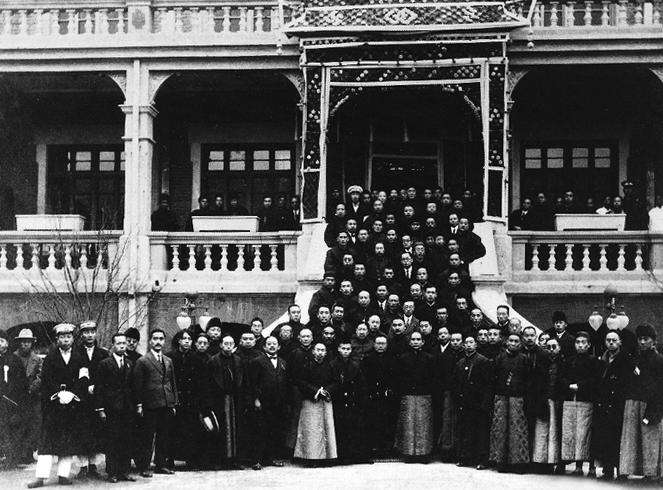 1924年孙中山北上，居住天津张园时与各界人士的合影